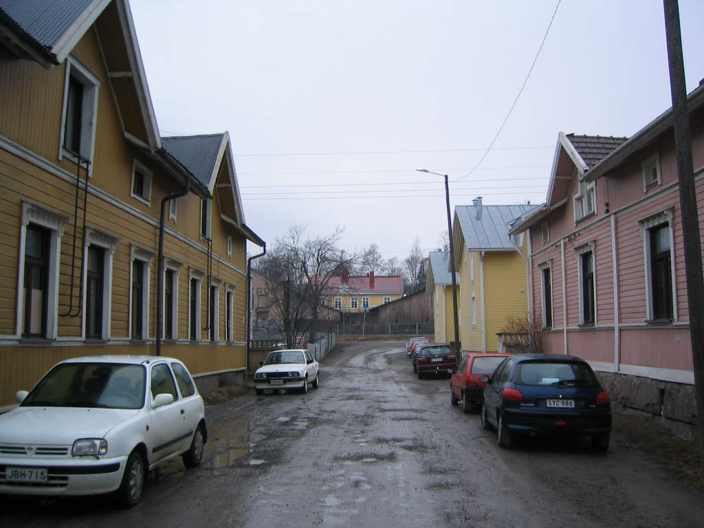 Lokinkatu Lonttisissa.